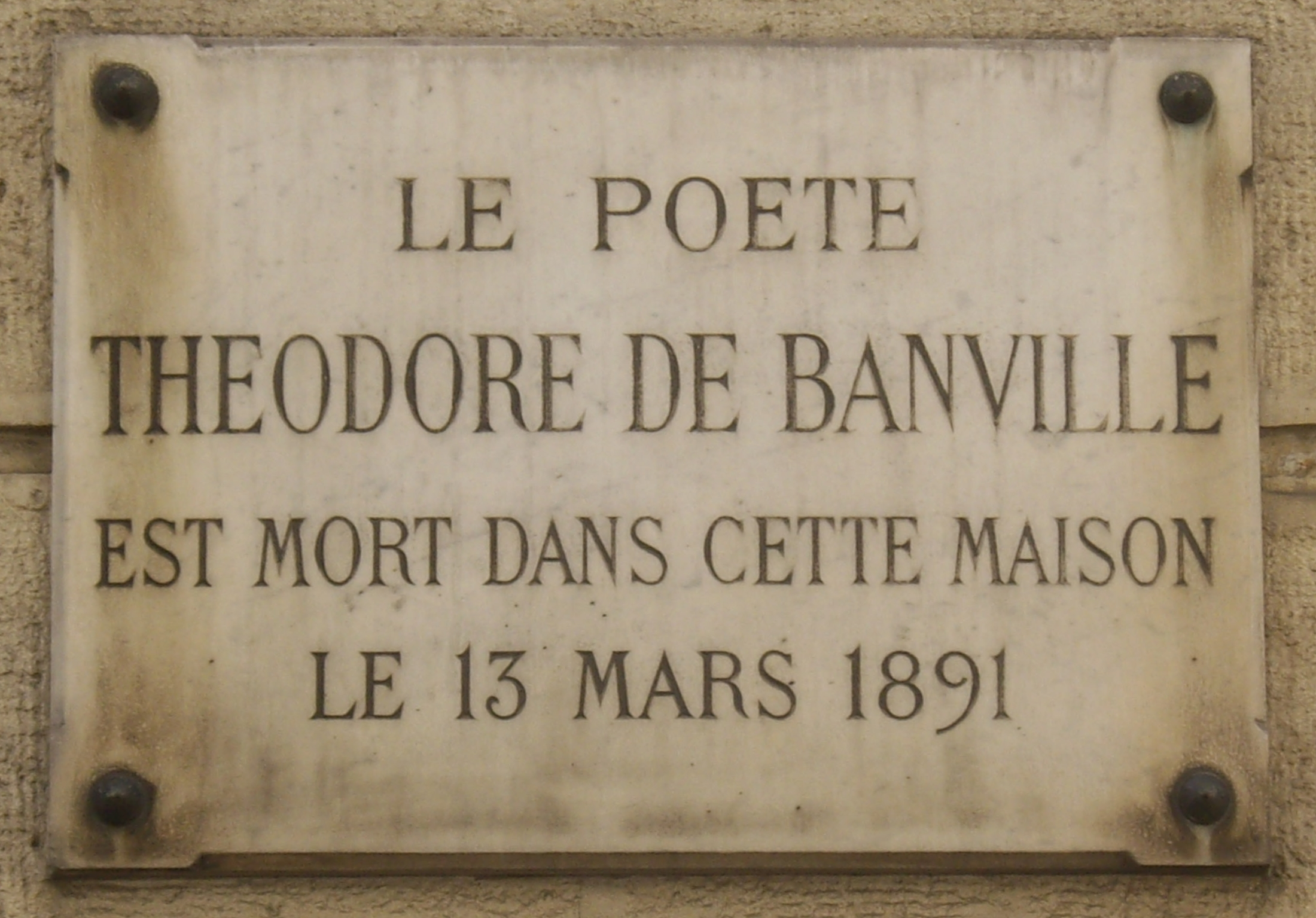 Plaque apposée au n° 10 de la rue de l'Éperon, Paris 6e, où mourut le poète et auteur dramatique Théodore de Banville (1823-1891) le 13 mars 1891.